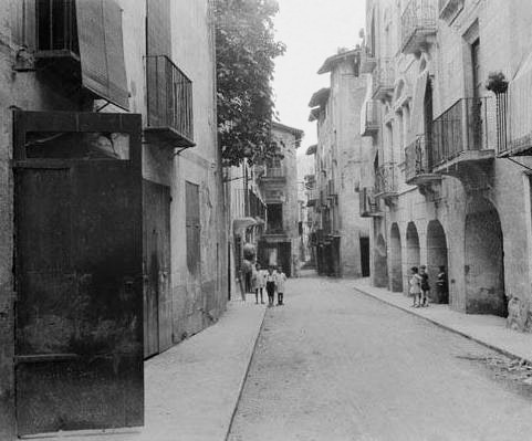 Carrer dels Canonges a la Seu d'Urgell. Rafael Degollada i Castanys (Entre 1912 i 1924)